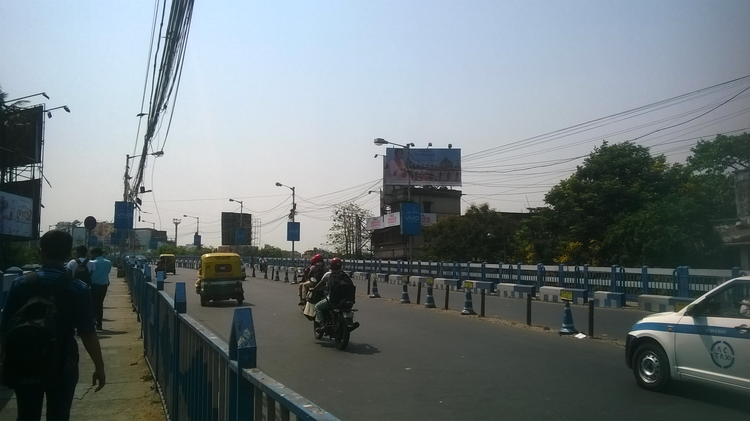 বিজন সেতু, বালিগঞ্জ